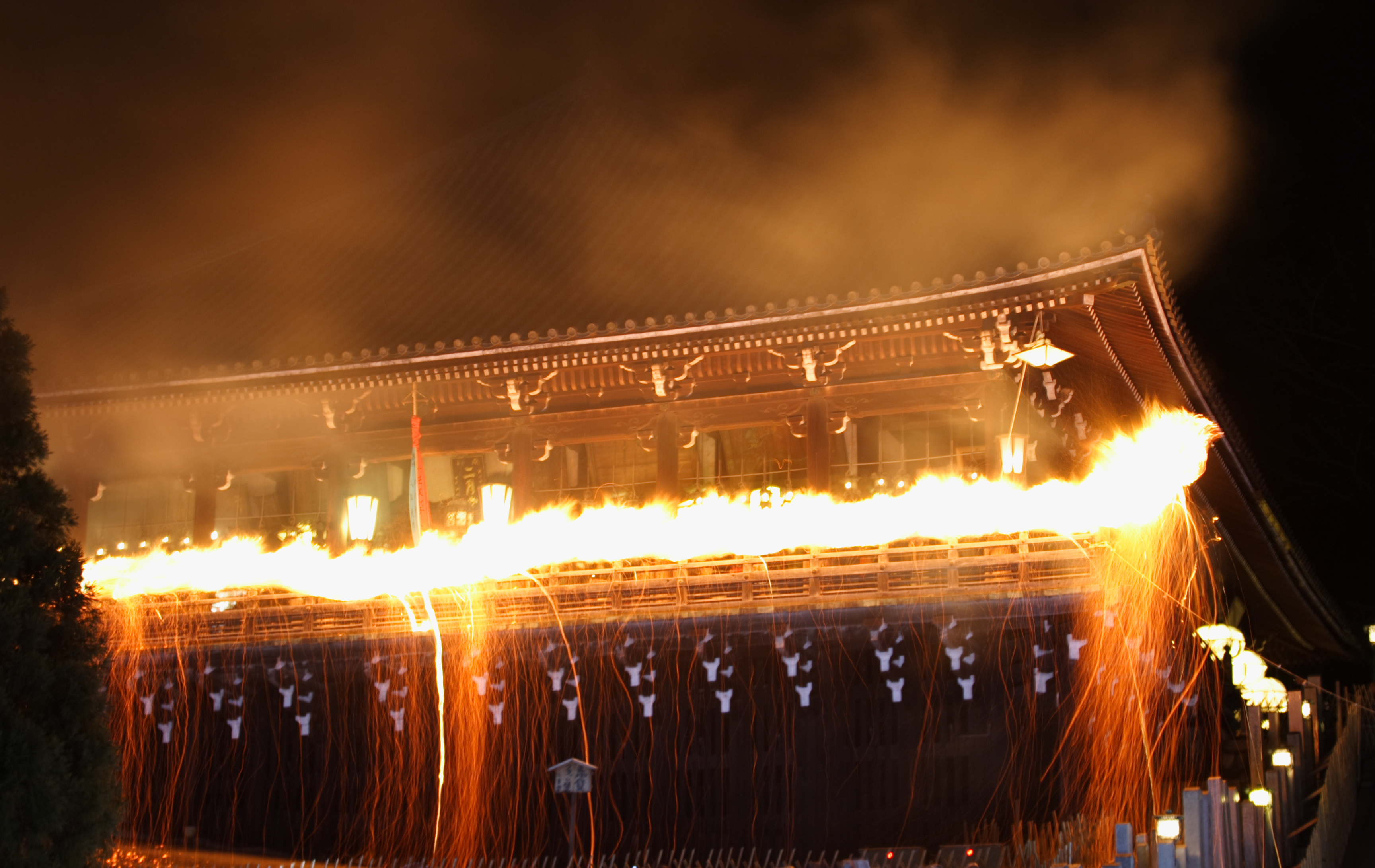 東大寺の修二会/Syunie of Tōdai-ji(Nara, Japan)